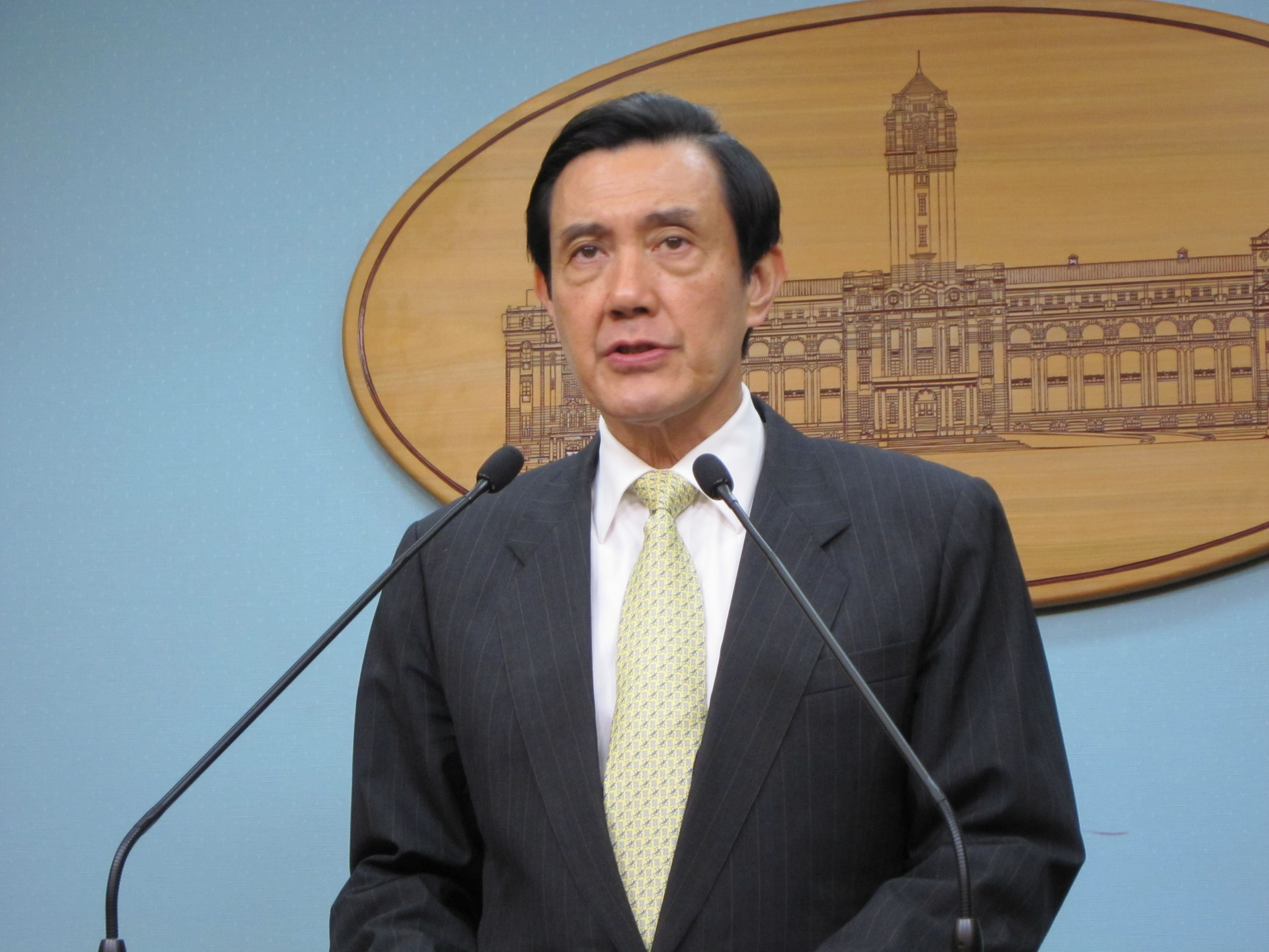 中文（台灣）: 台灣總統馬英九